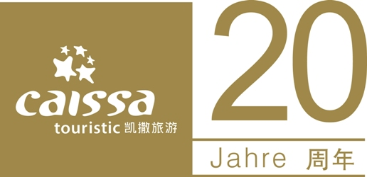 Jubiläumslogo der Caissa Touristic (Group) AG